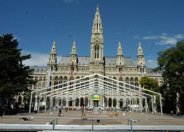 Abbauarbeiten am Tag nach dem Wiener Tierschutztag auf dem Rathausplatz